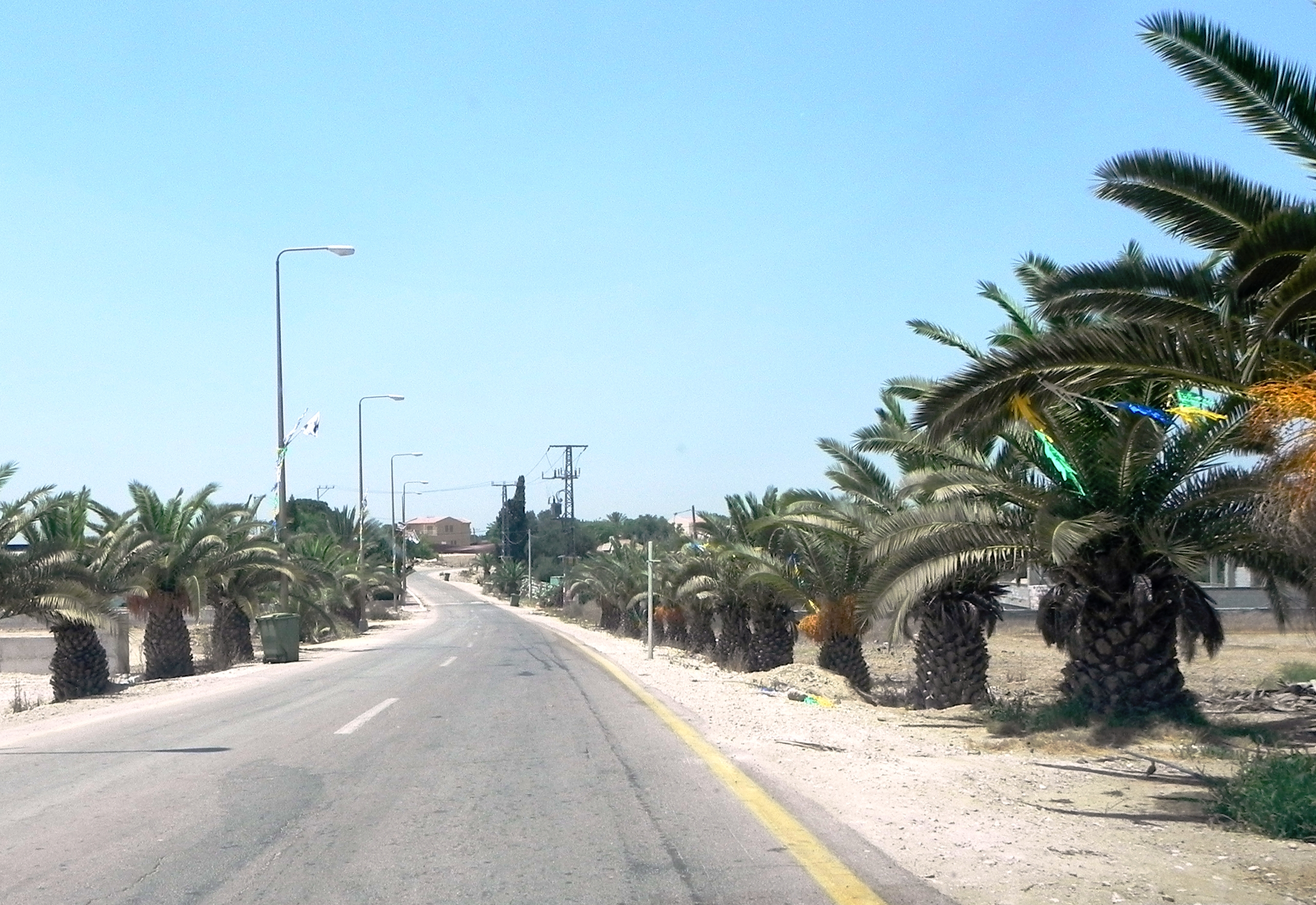 דרך הכניסה למושב